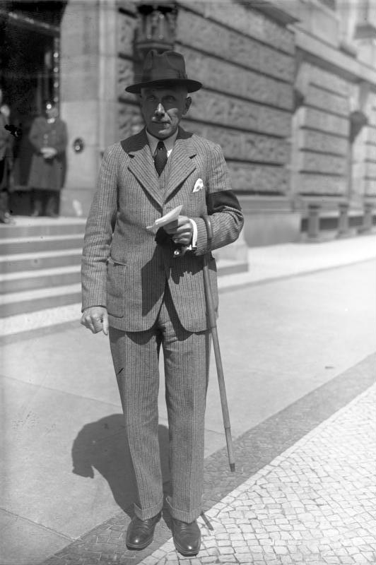 Franz von Papen, der neue Leiter der Reichsregierung ! Neueste Aufnahme des Reichskanzlers.